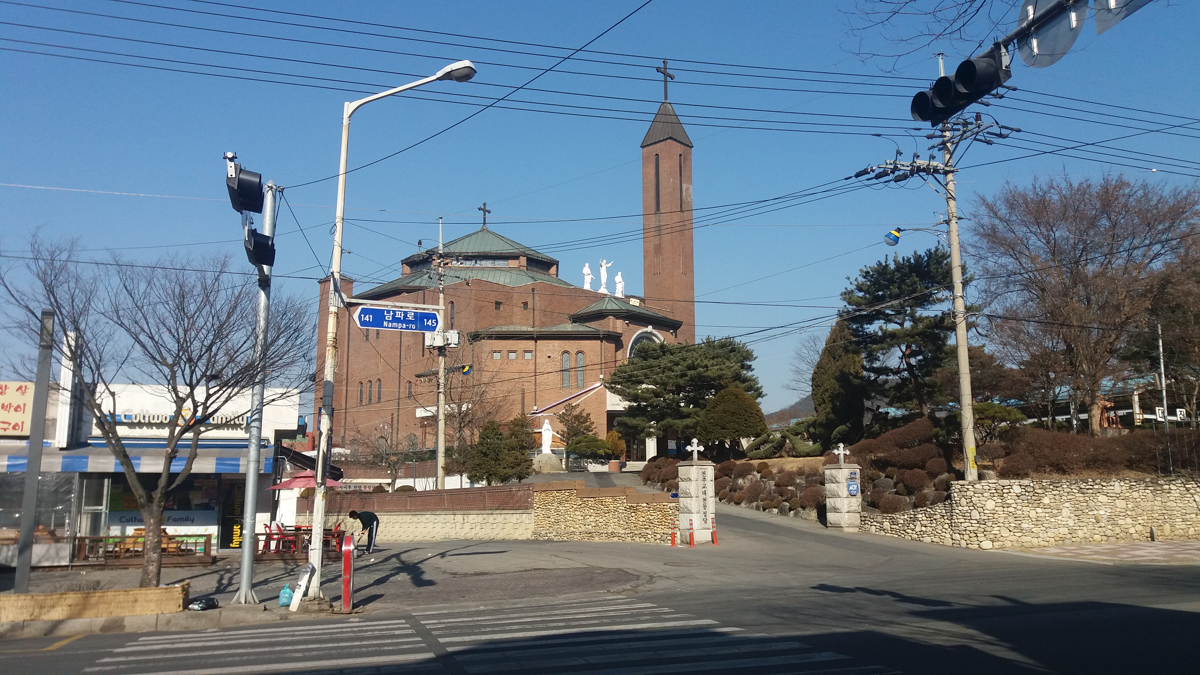 가톨릭당왕동성당